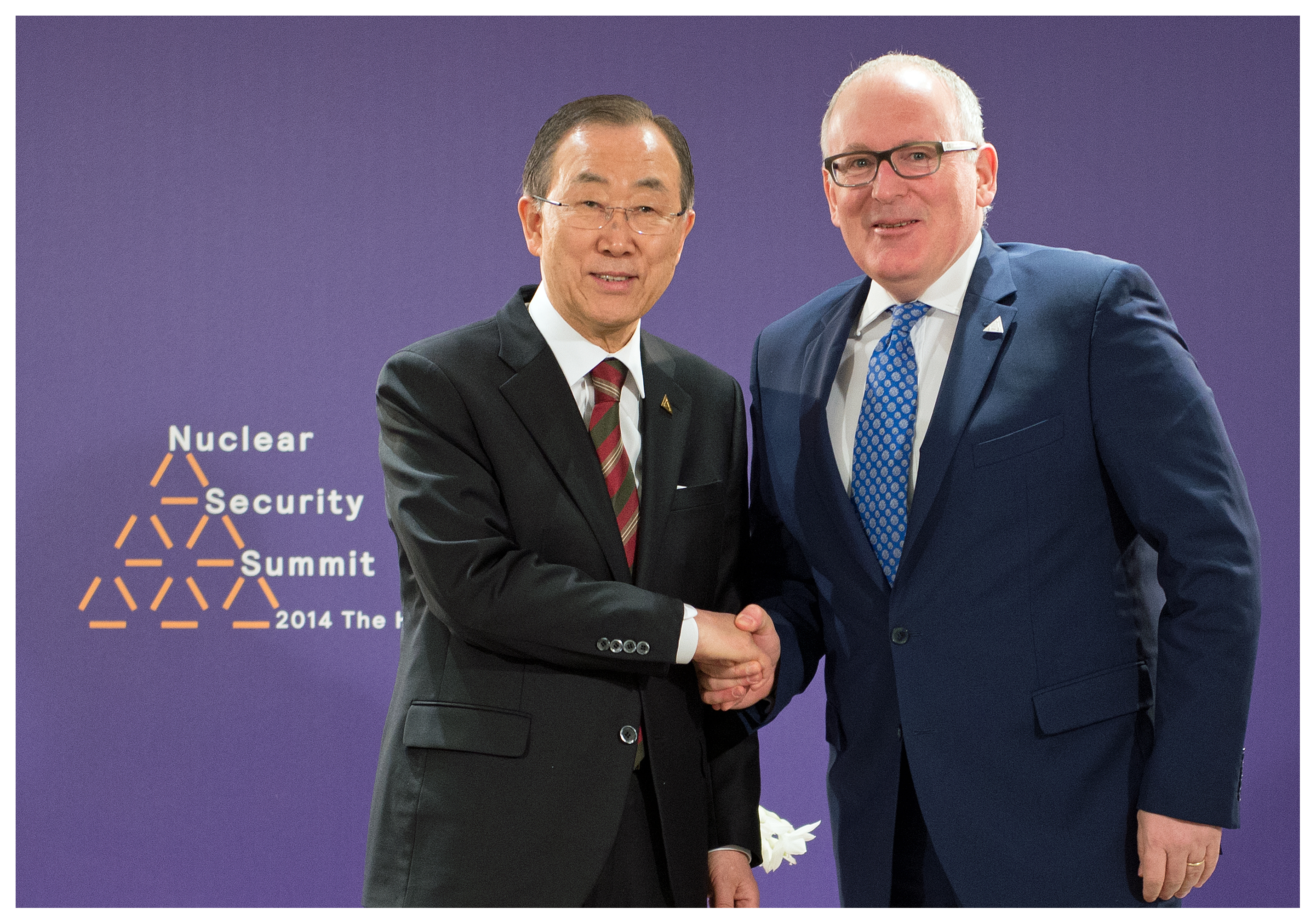 140325 Ban Ki-moon en Timmermans tijdens NSS